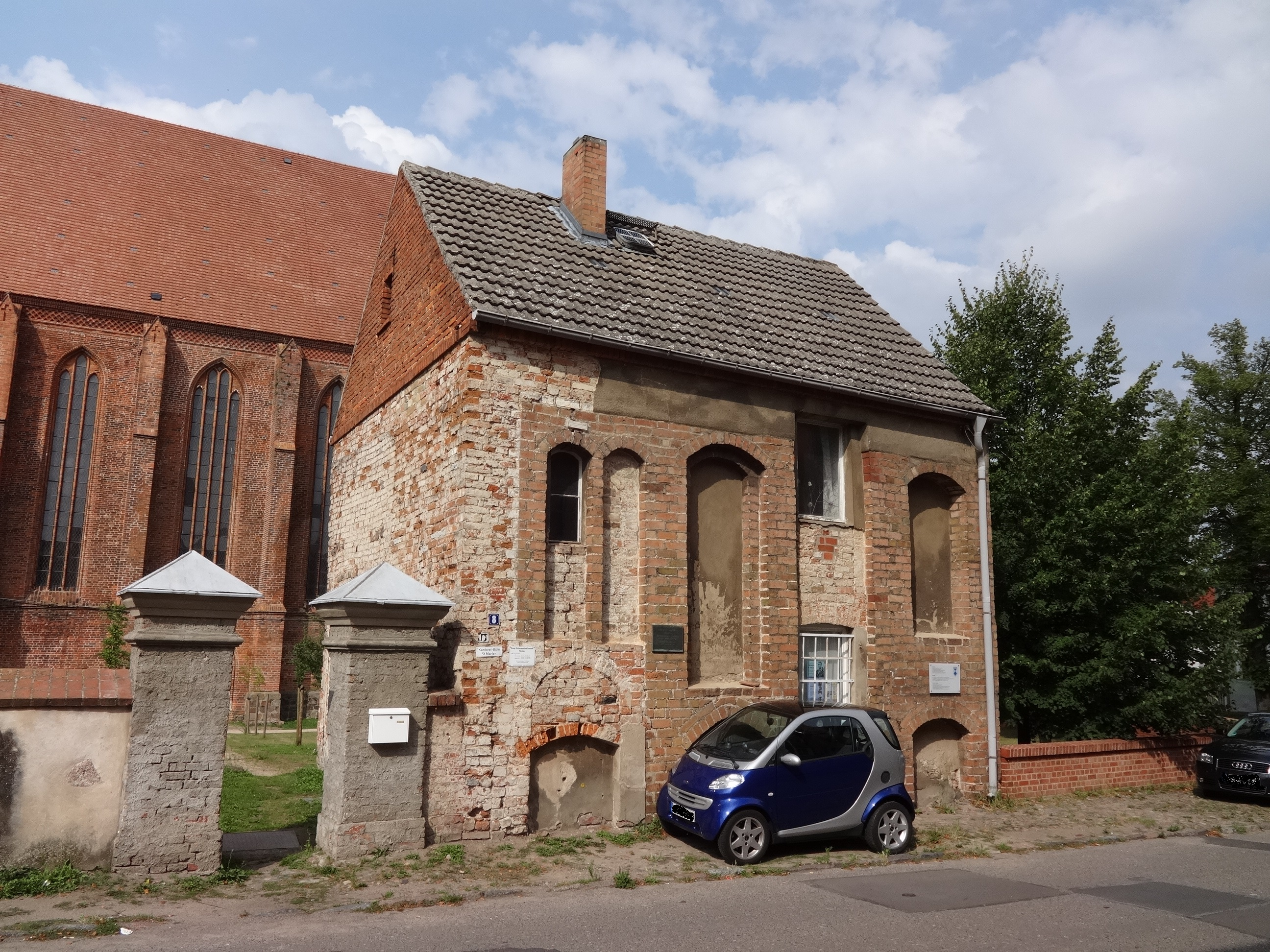 Das Elenenhaus (auch Elendshaus bezeichnet) ist das älteste Wohnhaus der Stadt. Es nahm mittellose Fremde und Pilger auf und wird heute als Verwaltungsgebäude der St.-Marien-Kirche genutzt.